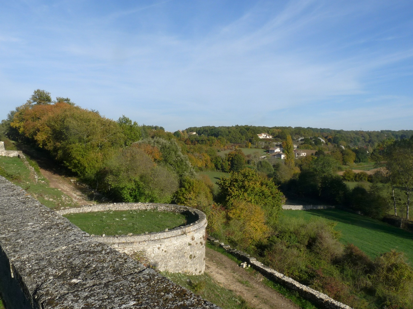 Château de la Tranchade, Garat, Charente, France. Vestige d'une ancienne fuie